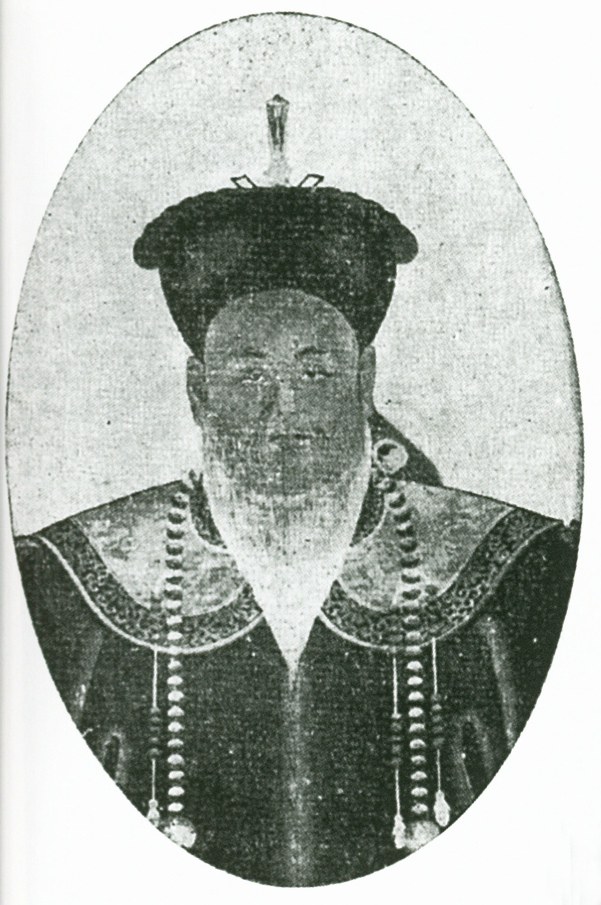 張兆棟（1821年－1887年），中國清朝官員，字友山，山東濰縣（今濰坊市）人。